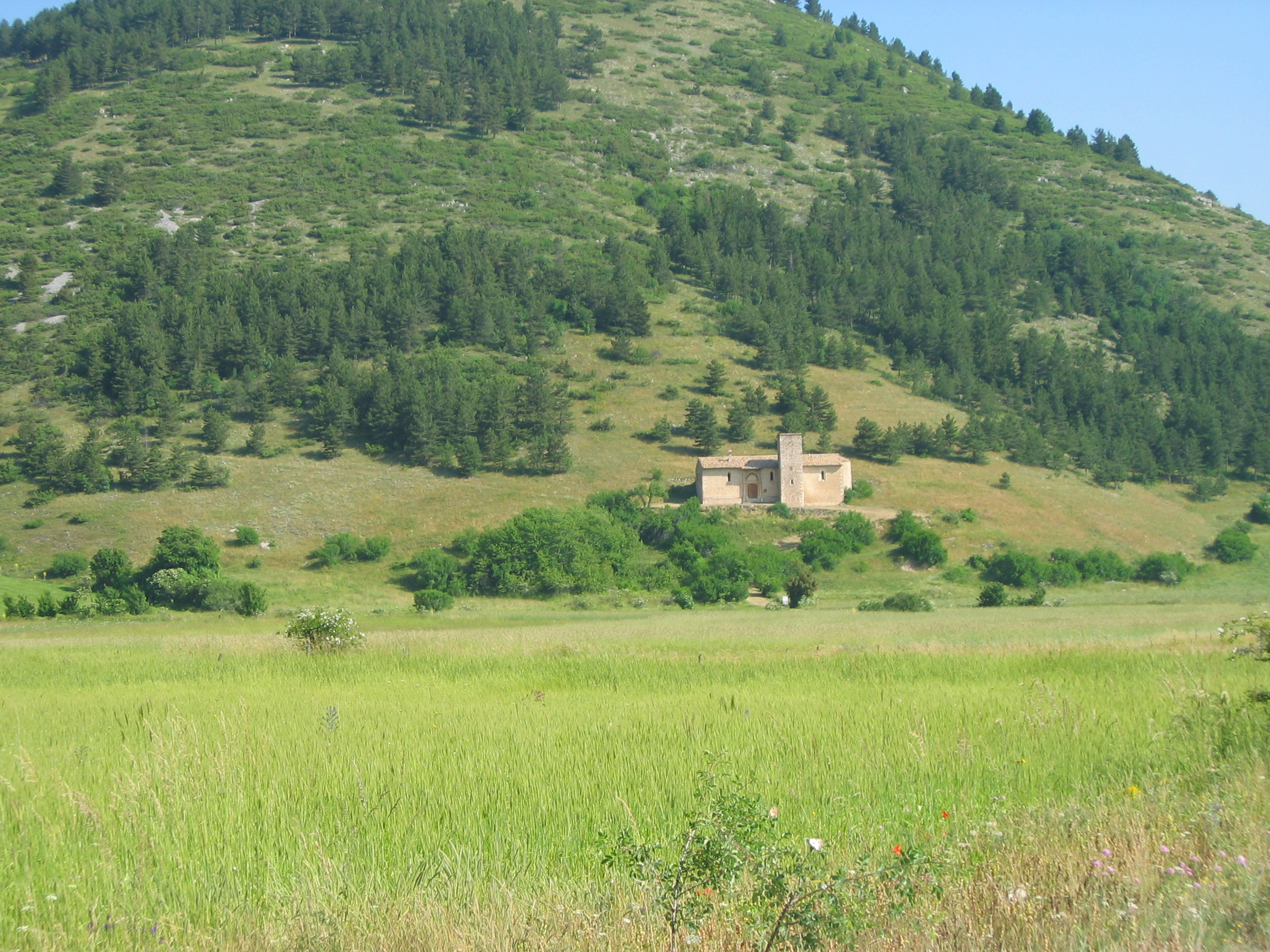 Chiesa della Madonna del Casale Montagna Spaccata - Rocca Pia